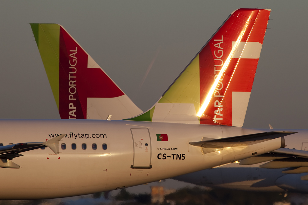 Lisboa